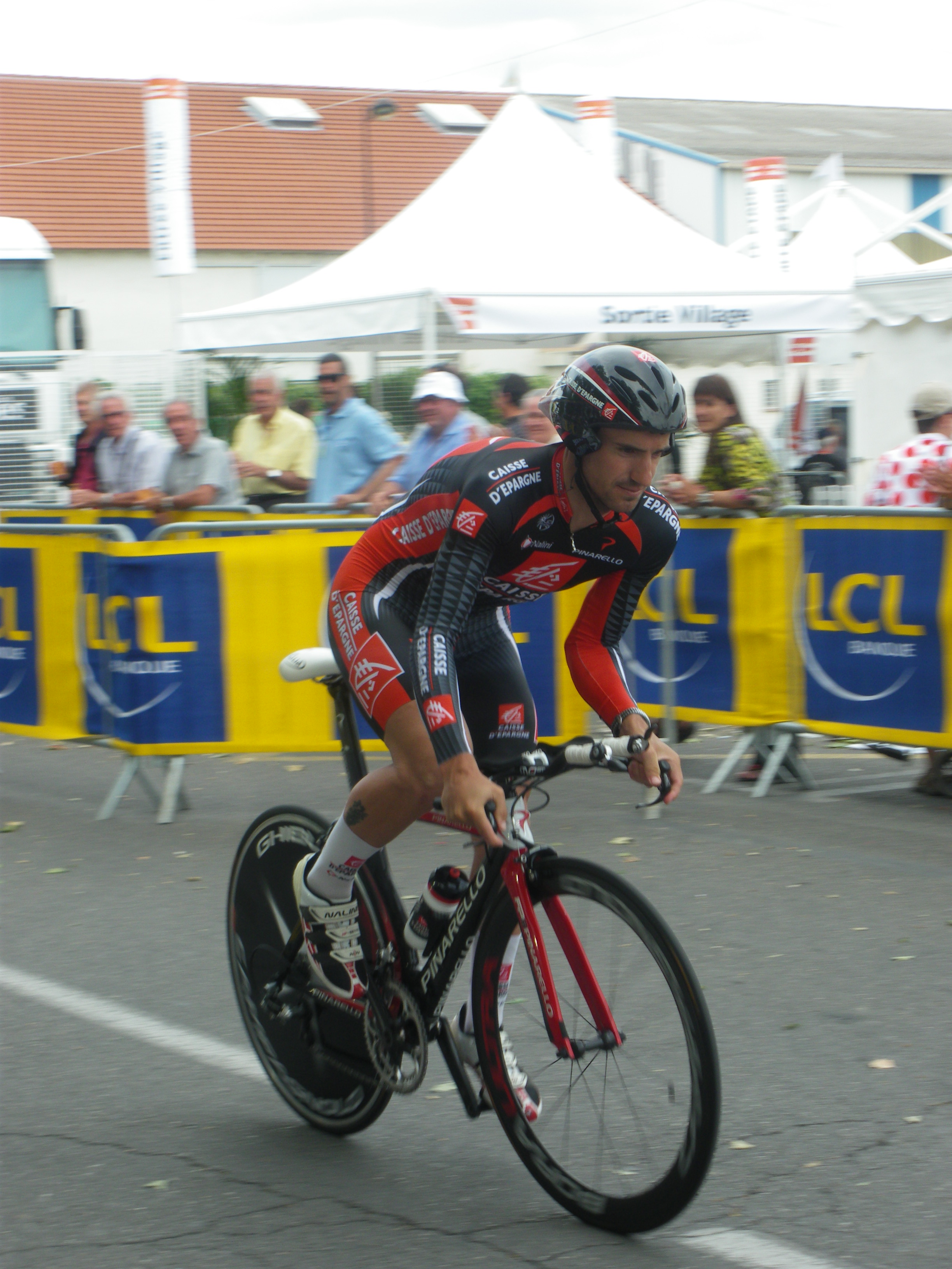 Juan Jose Cobo Acebo lors de la 3ème étape du Dauphiné Libéré 2010 (Monteux - Sorgues)